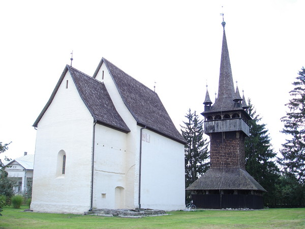 A lónyai református templom és fatorony hátulról